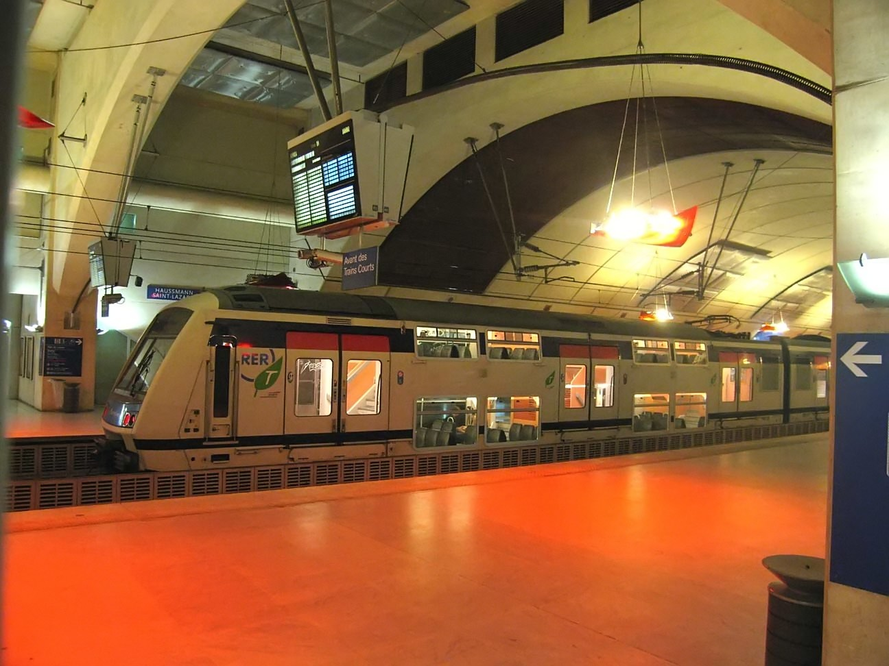 RER Paris ligne E rame Z22500 a la station Haussman Saint Lazare Lieu : Paris, France Date : Juin 2006 Auteur : Pline photo personnelle